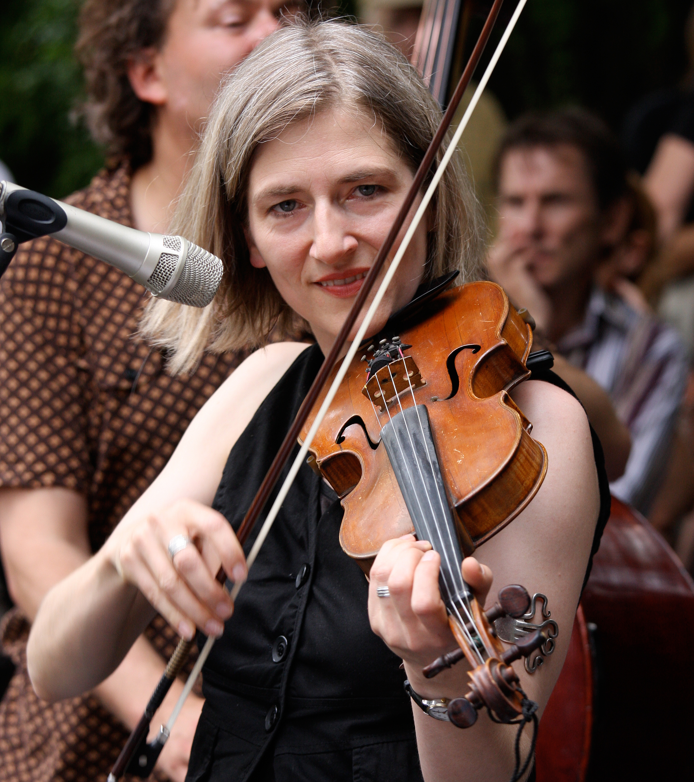 Verena Guido, Sängerin und Instrumentalistin